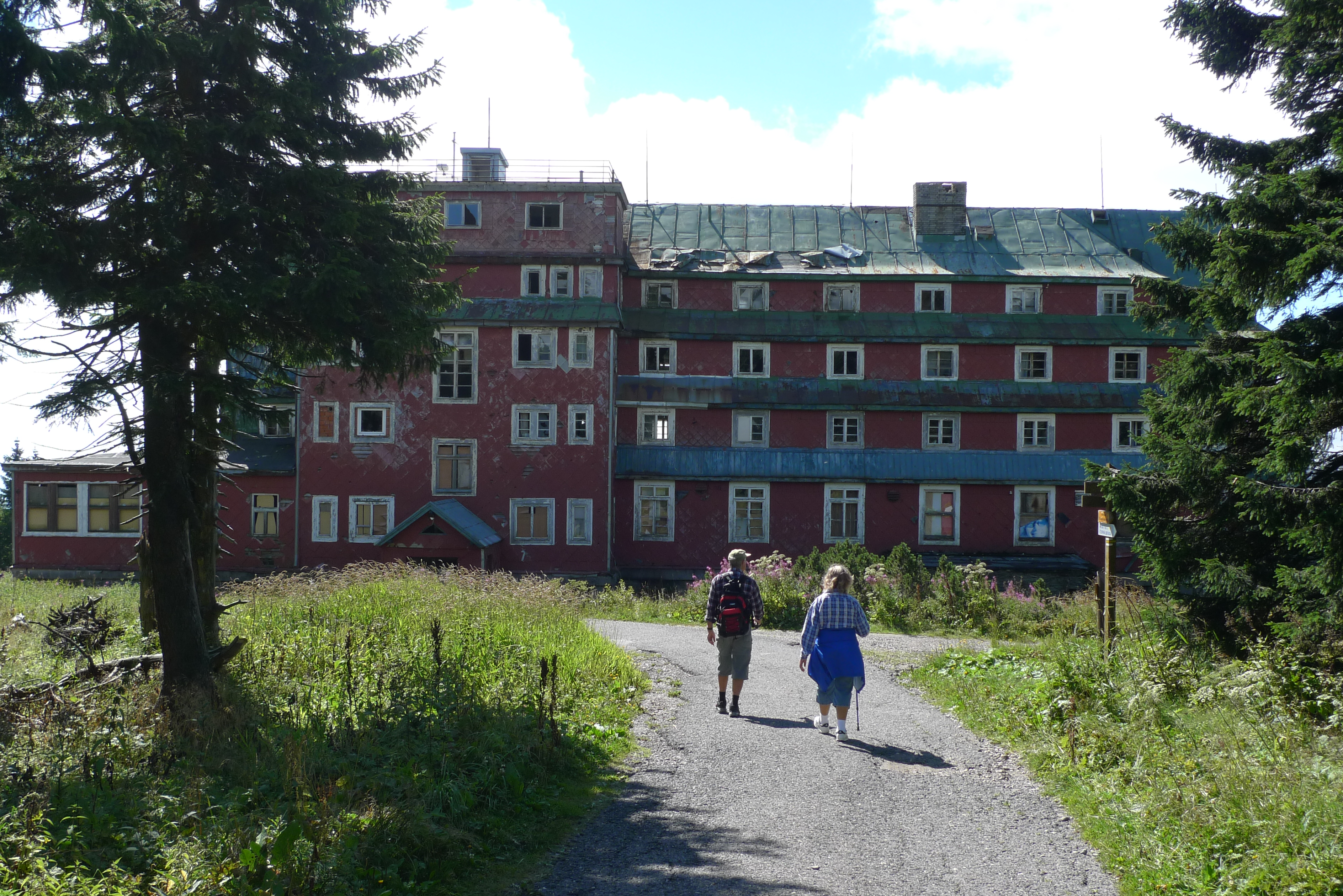 Sokolská bouda na Černé hoře v Krkonoších v roce 2012.